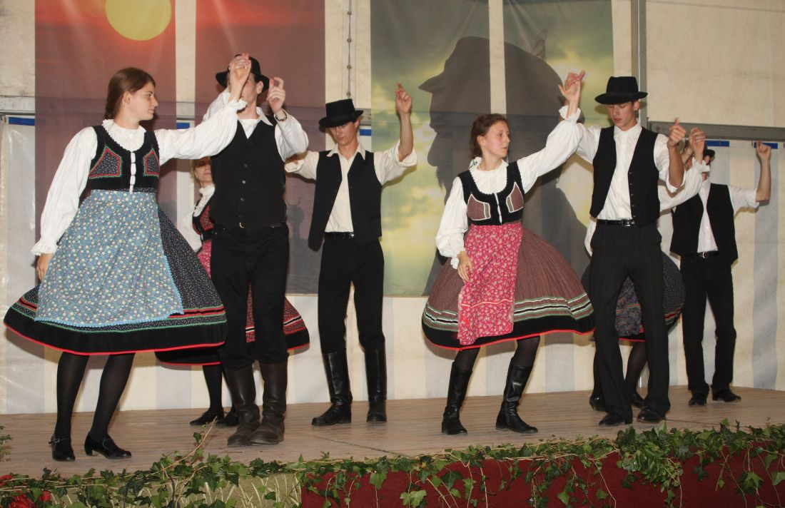 Ürmös Néptáncegyüttes, palatkai táncok, Fertőújlak (Mekszikópuszta)